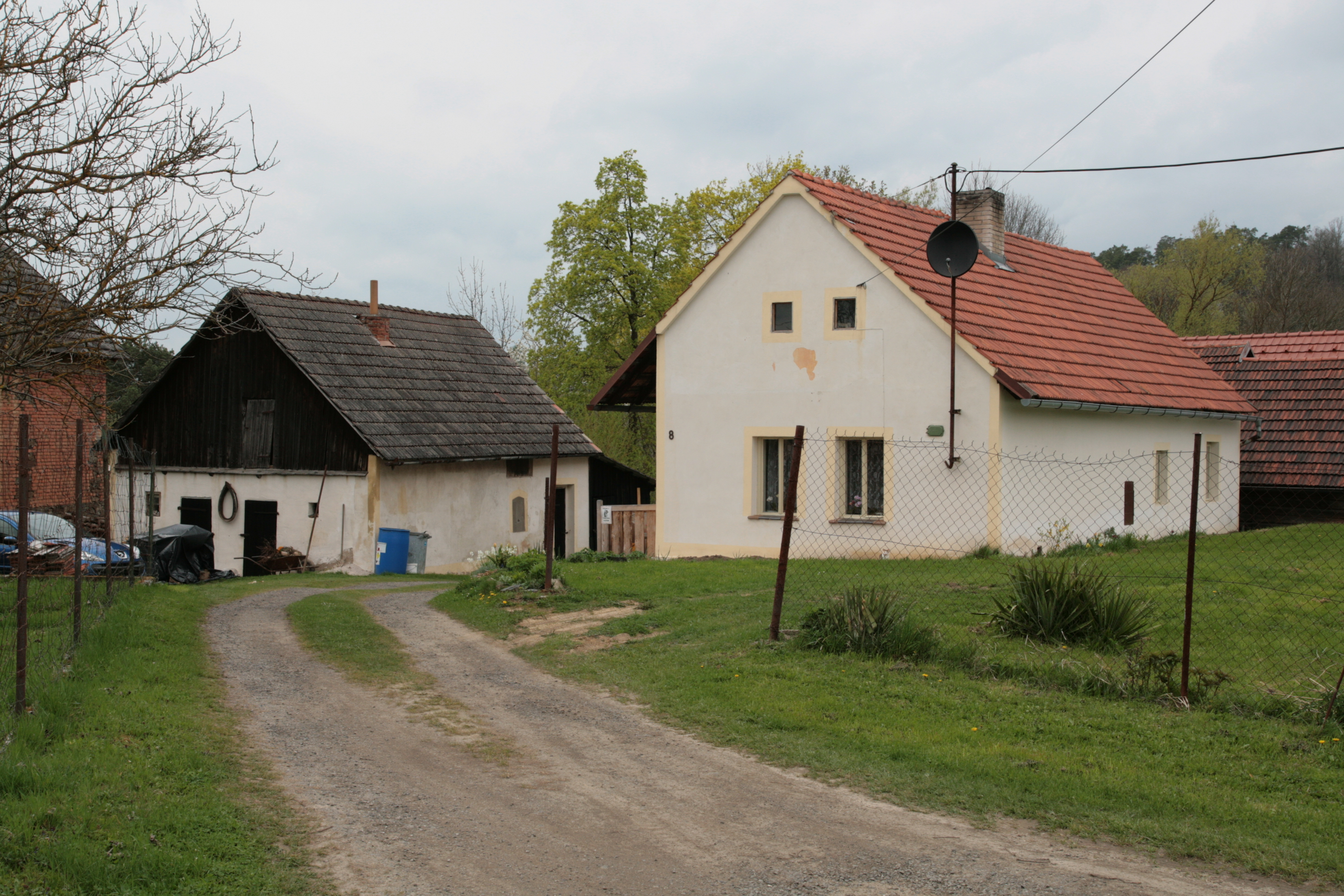 Vesnice Hráz, část města Měčín v okrese Klatovy. Statek čp. 8 na jižním okraji vsi.